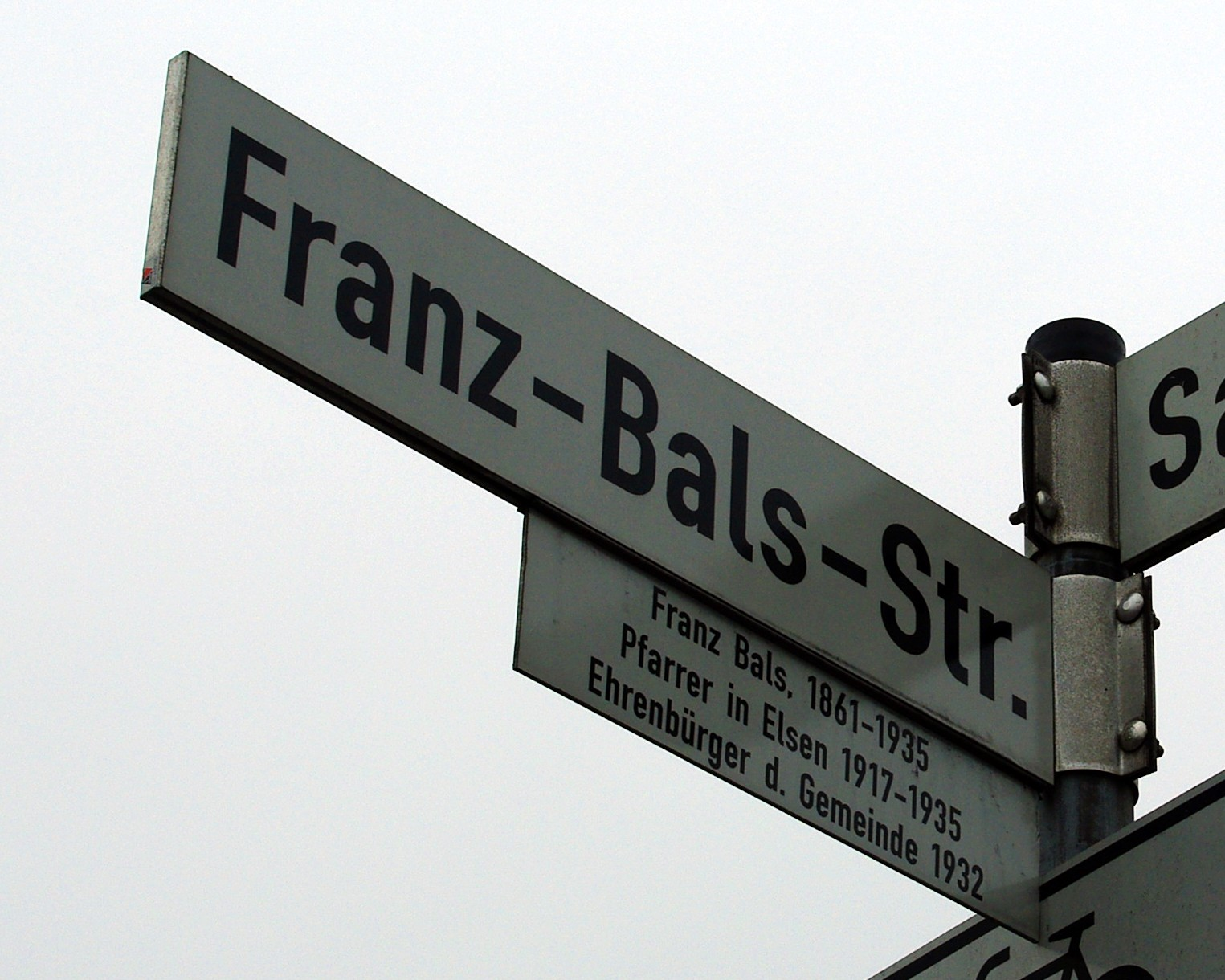 Elsen, Paderborn, Deutschland: Straßenschild der Franz-Bals-Straße. Franz Bals war 1932 zum Ehrenbürger der ehemals selbstständigen Gemeinde ernannt worden.